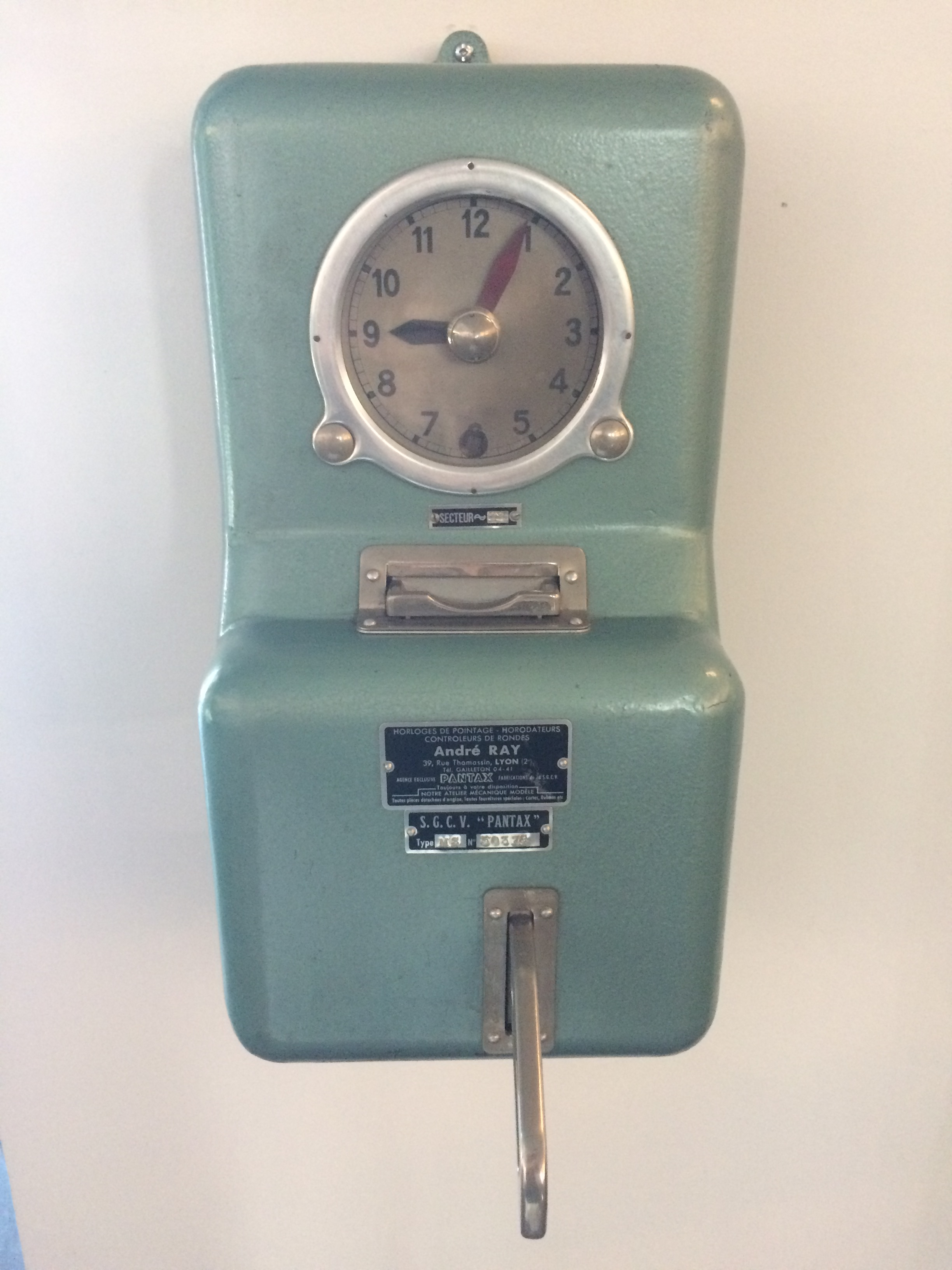 Pointeuse, modèle "Pantax" de la S.G.C.V (Saint-Gobain Conceptions Verrières). Modèle exposé au centre culturel "Le Rize" à Villeurbanne dans le cadre de l'exposition "Et ils sont où les ouvriers ?" en 2015.